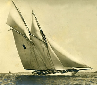 Meteor IV - Max Oertz -1909 durant la semaine de Kiel - Circa 1909-1914 - goélette acquise par Virginie Hériot en 1923 et renommée Ailée